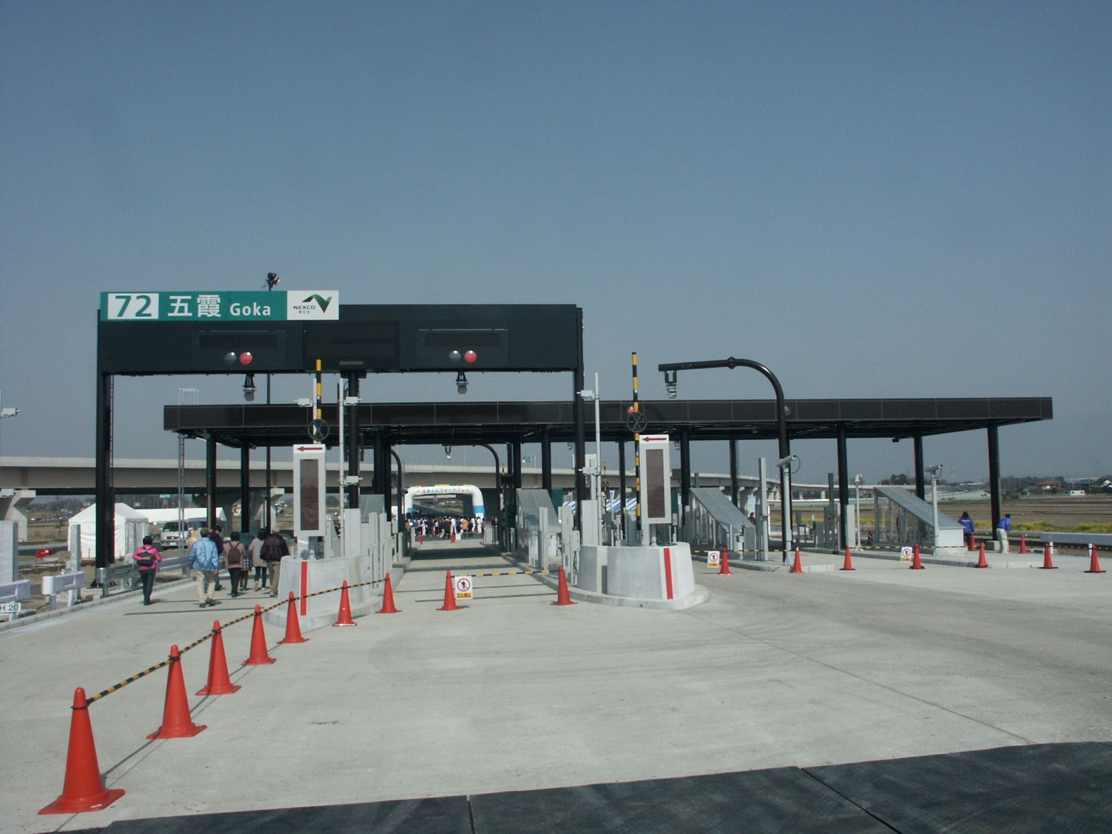 首都圏中央連絡自動車道五霞インターチェンジ料金所